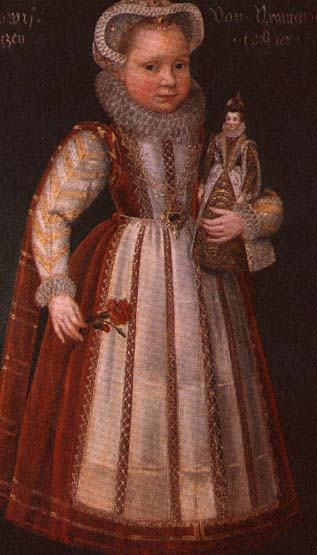 Portrait of Louise Juliana van Nassau (1576-1644)